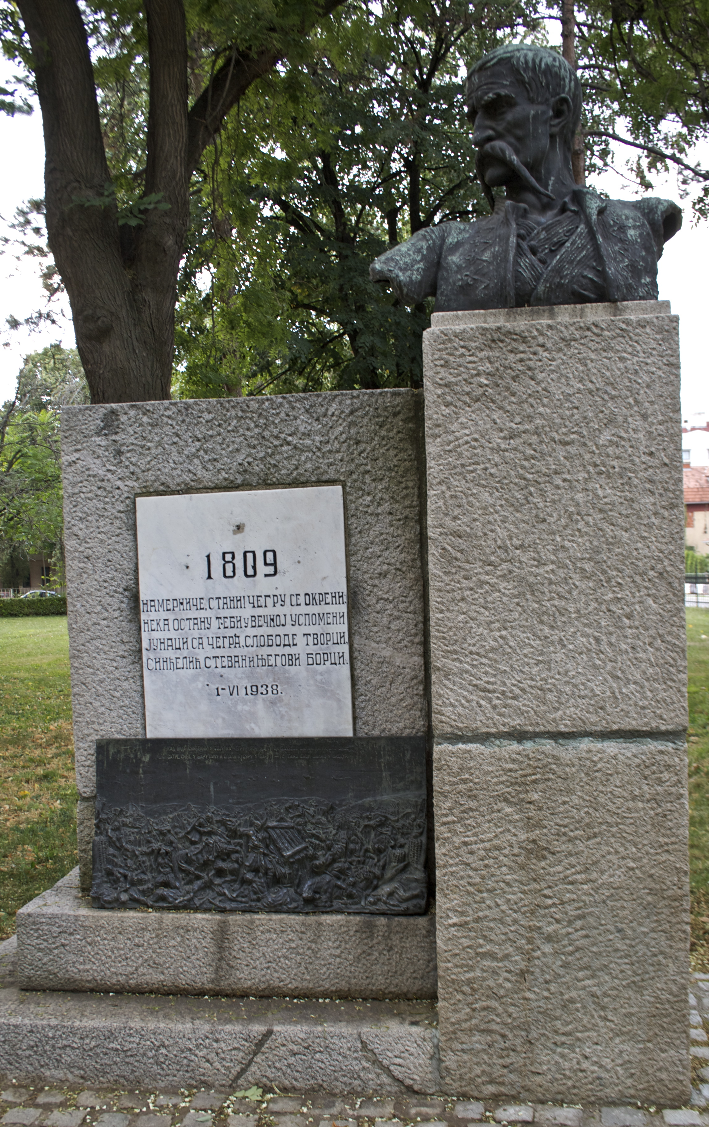 Биста Стевана Синђелића - поред Ћеле куле